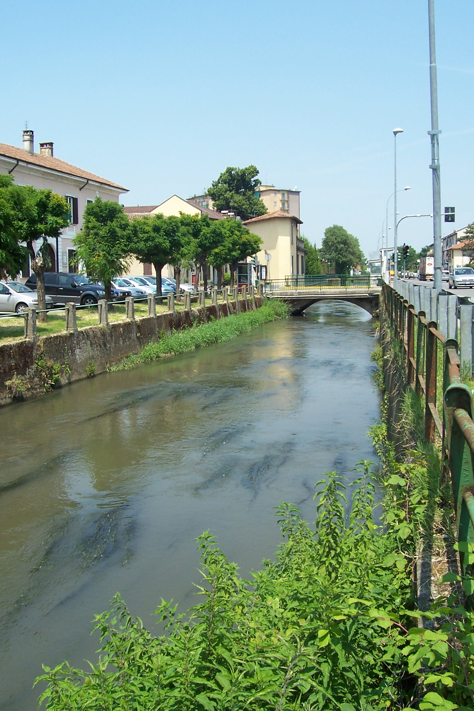 Il navigliaccio Lungo la Statale 35